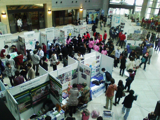 ワン・ワールド・フェスティバル２０１２会場の様子